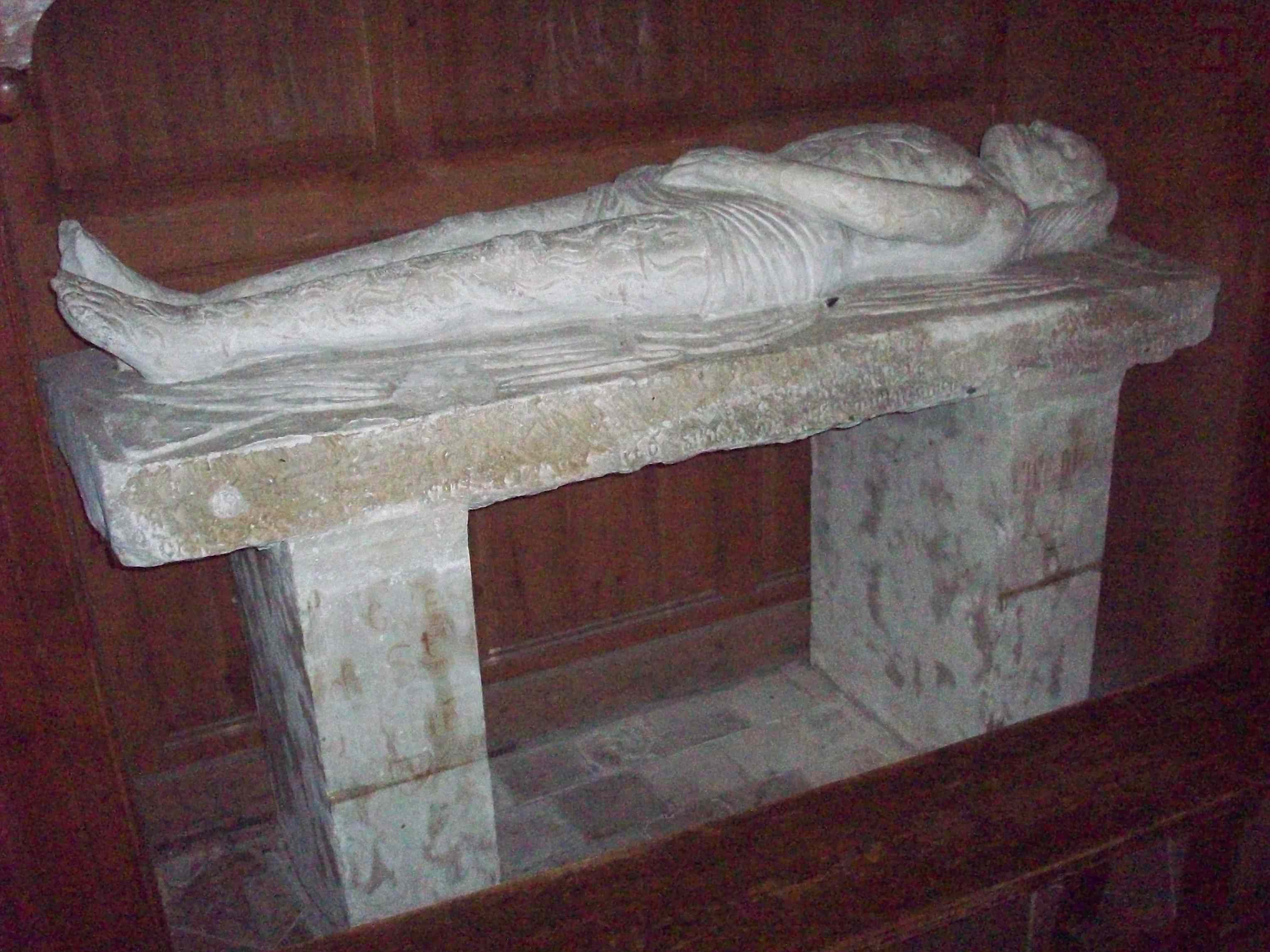 Transi d'Hugues de Saint-Jovinien, dite du "Lépreux", provenant de l'abbaye de l'Isle-Dieu. Statue en pierre calcaire du XVe siècle. Conservée dans le bras sud du transept de l'église de Vascoeuil.